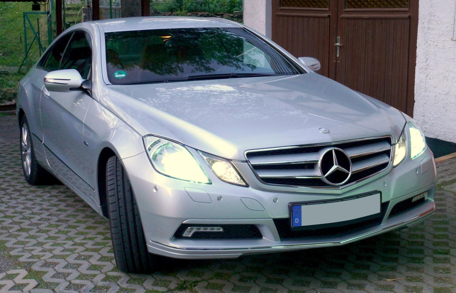 Mercedes-Benz C207 E 350 CGI